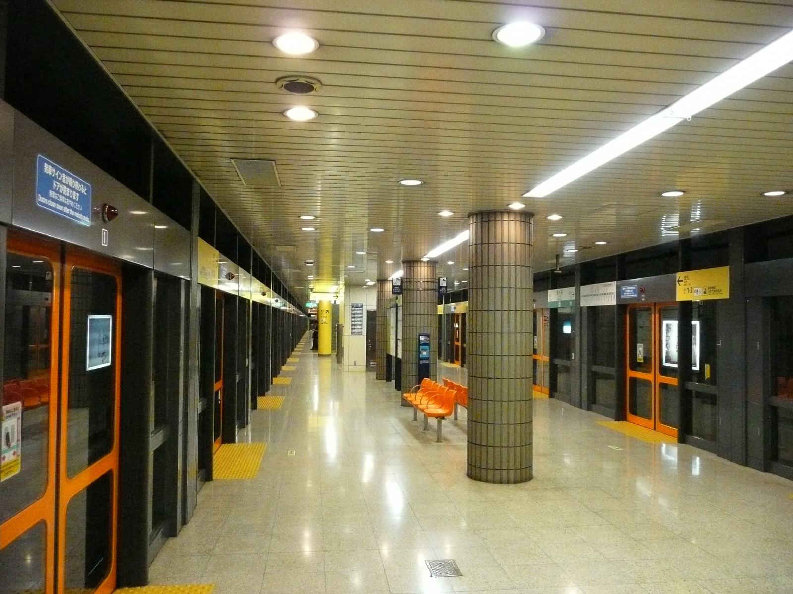 西ヶ原駅ホーム